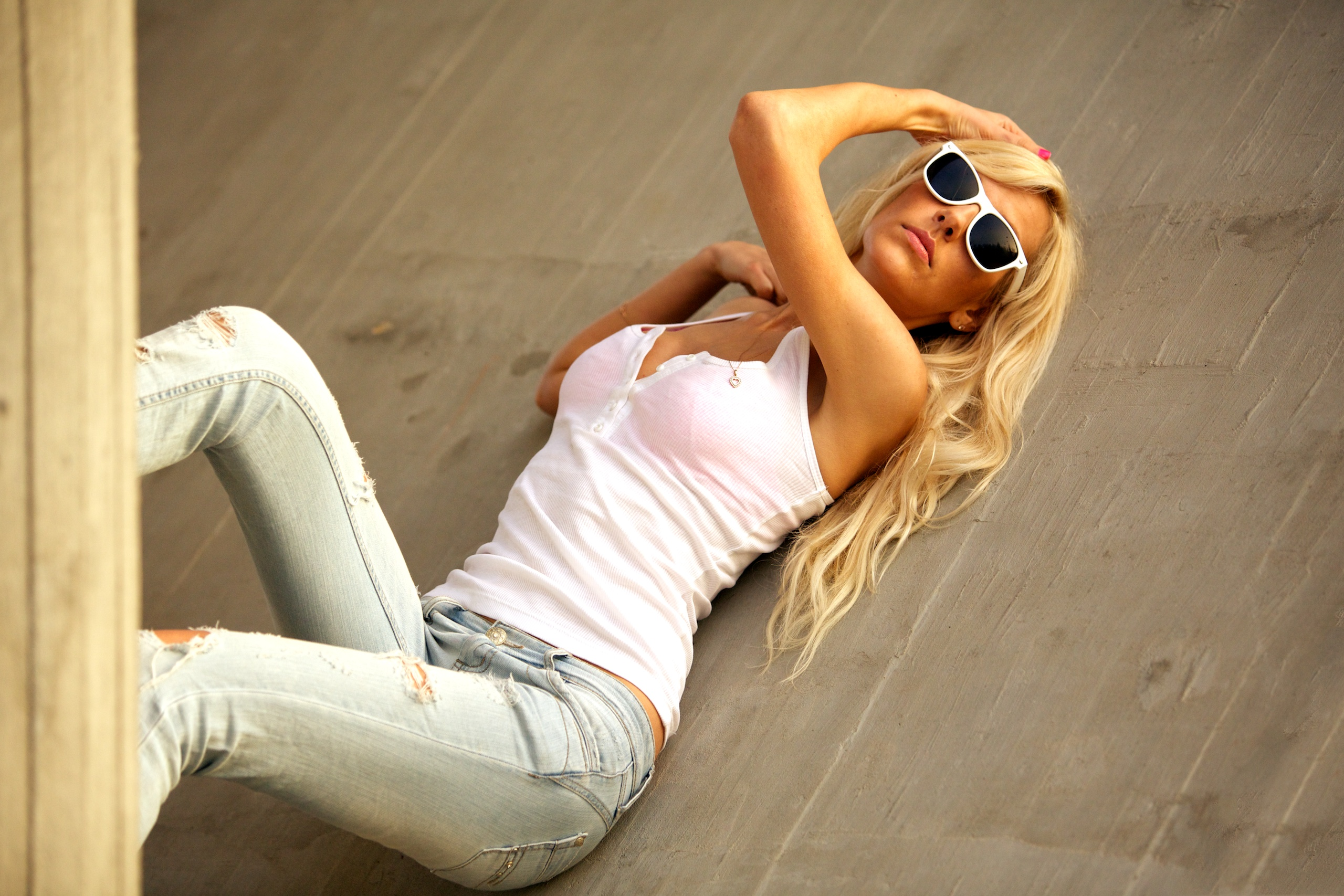 Zem Amatas tilta